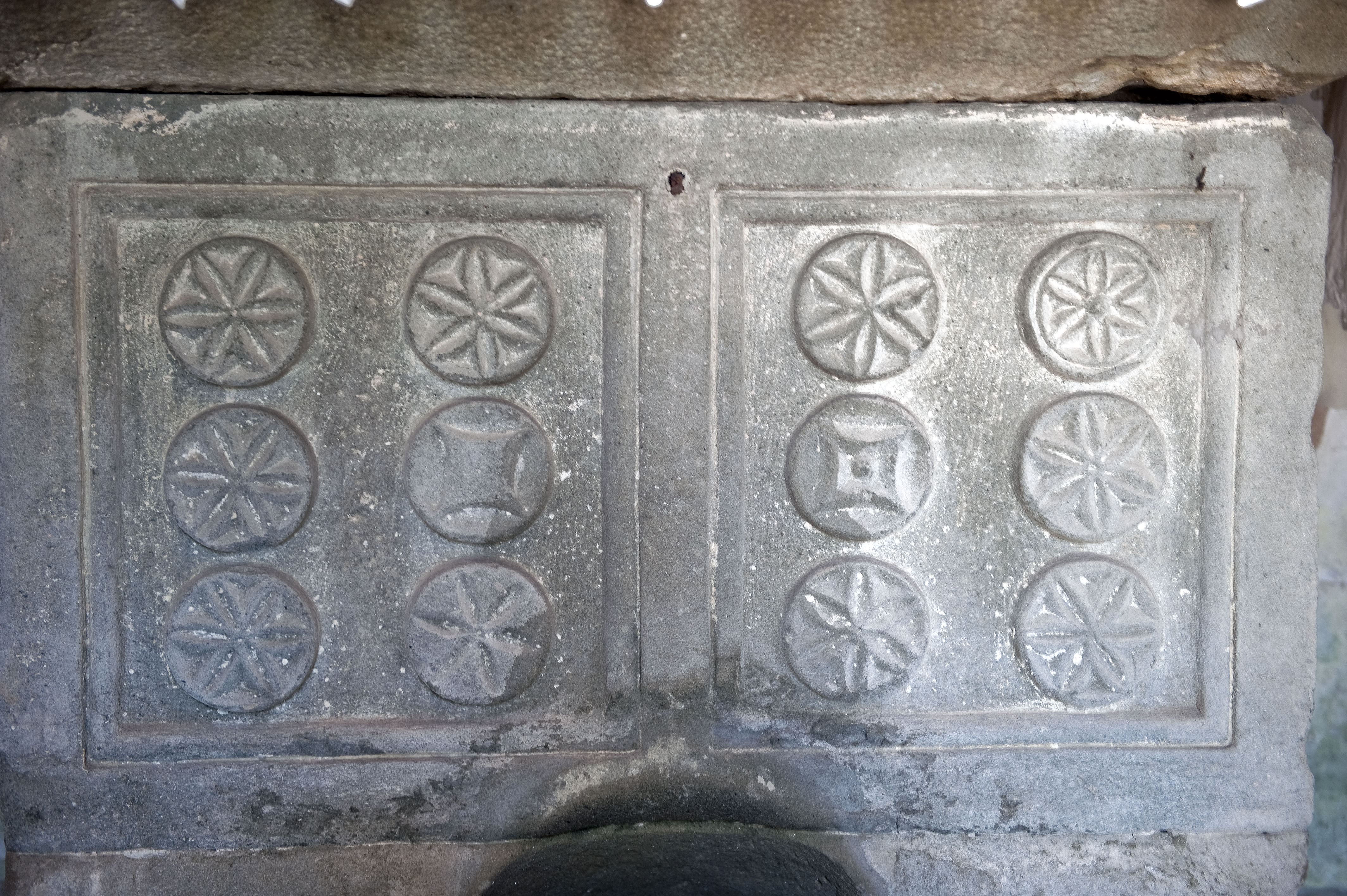 Altare in pietra serena (XI secolo), Oratorio di Sant'Eufrosino, Panzano in Chianti